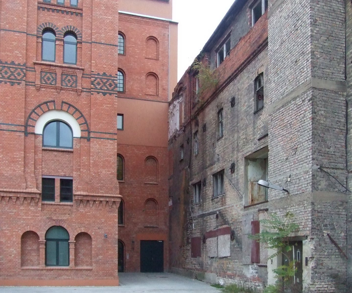 Böhmisches Brauhaus Berlin